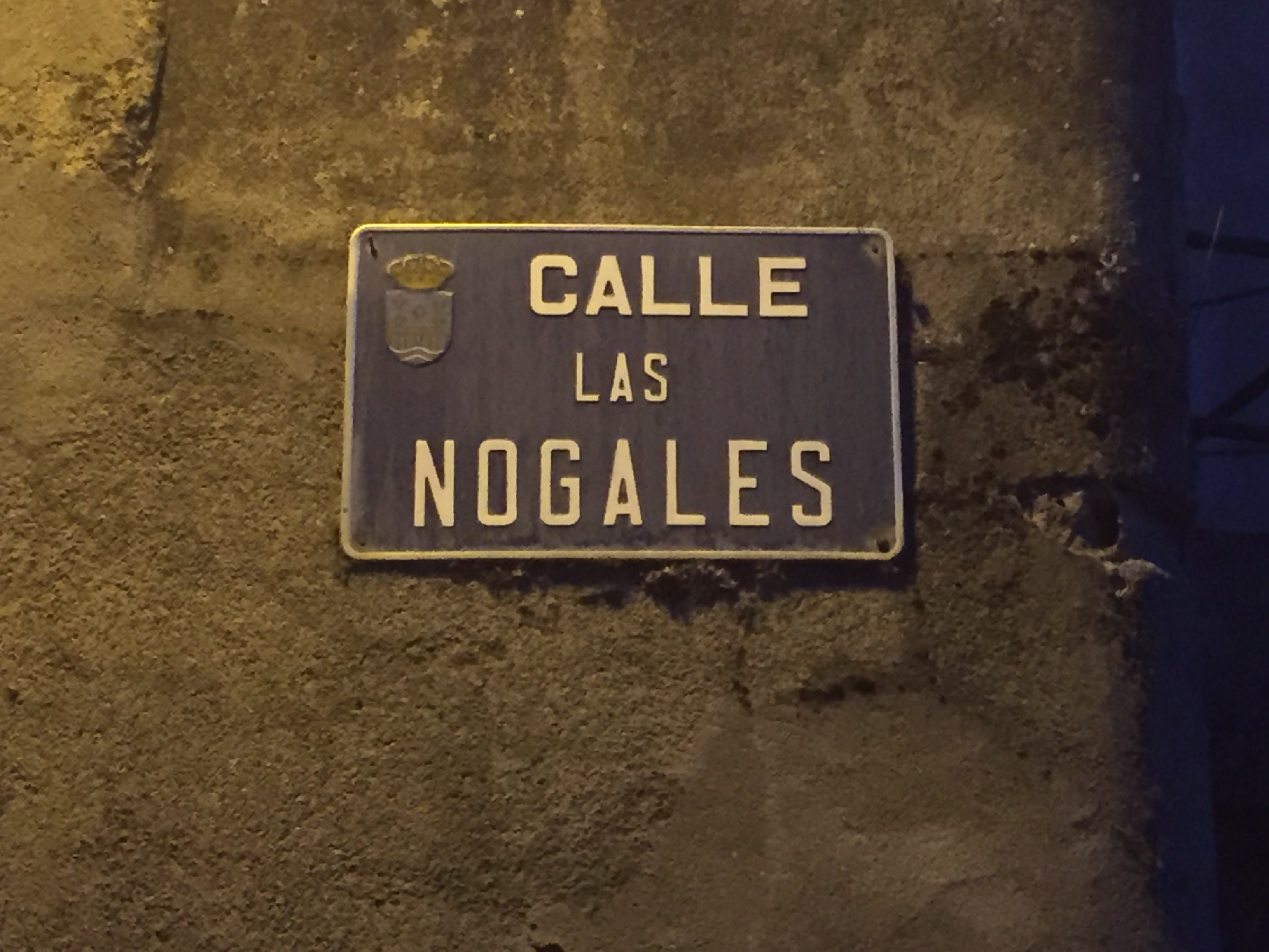 O castelán das áreas galegofalantes de León posúe trazos da morfoloxía galega, como o xénero feminino propio das árbores froiteiras.